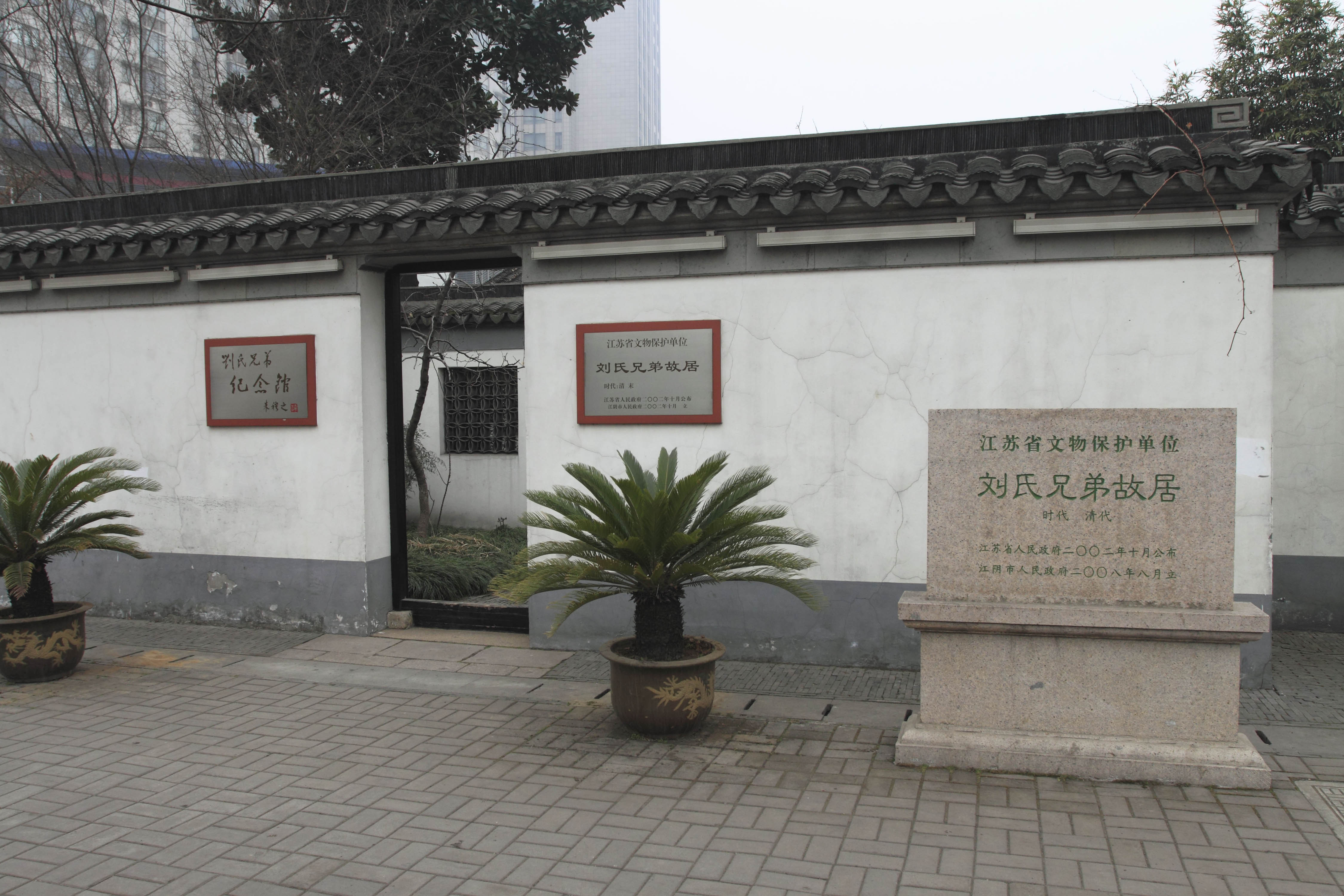 江阴市刘氏兄弟故居，江苏省文物保护单位